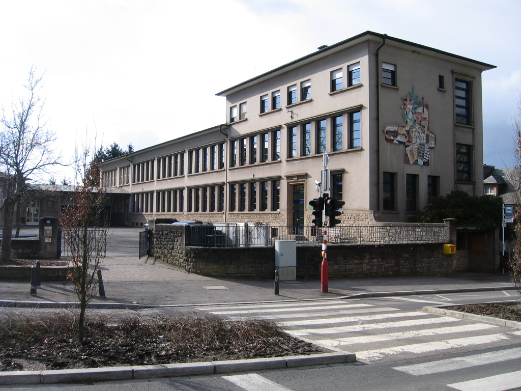 Zéissenger Primärschoul. 20. März 2007.